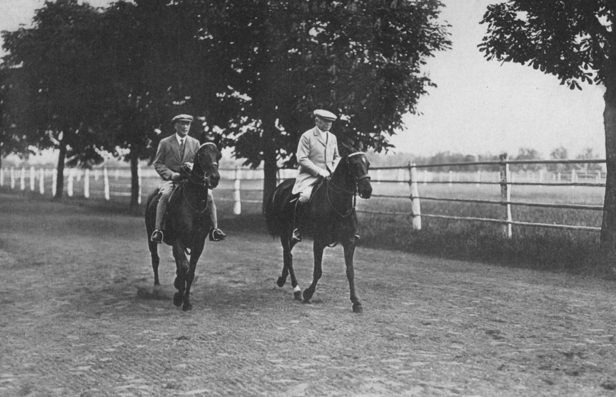 Die Brüder Arthur und Carl von Weinberg beim Morgenritt auf dem Gestüt Waldfried in Frankfurt Arthur von Weinberg (links), (* 11. August 1860 in Frankfurt am Main; † 20. März 1943 in Theresienstadt) Carl von Weinberg (rechts), (* 14. September 1861 in Frankfurt am Main; † 14. März 1943 bei Florenz)